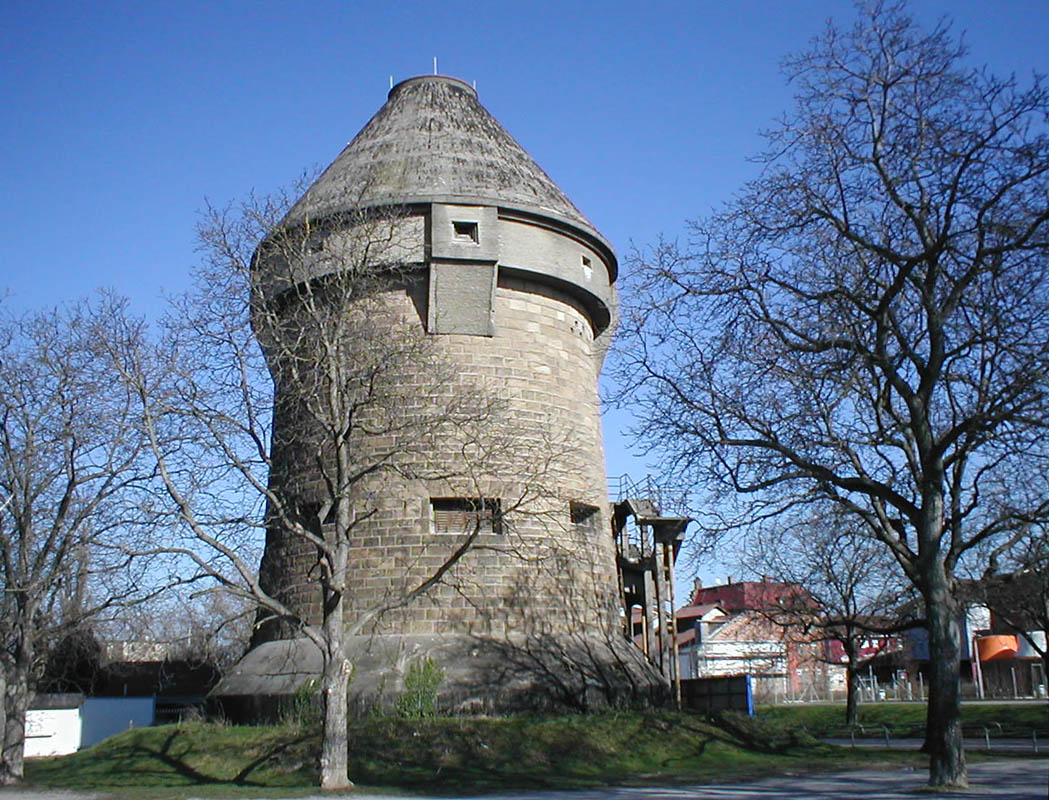 General-Wever-Turm in Heilbronn, Hochbunker erbaut 1940, Baureihe Dietel.